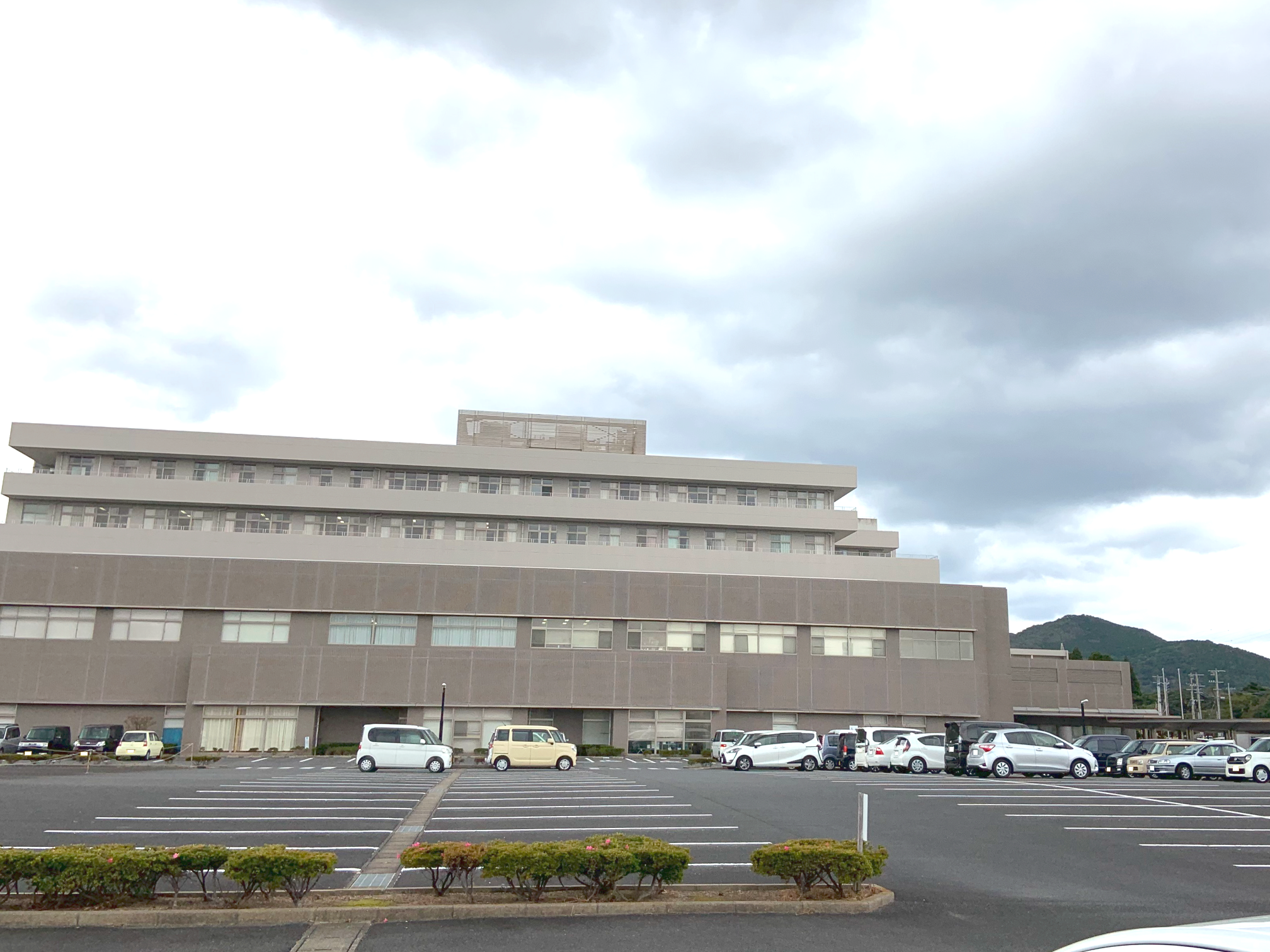 長崎県五島中央病院。駐車場より側面。右端1階がエントランスホール。